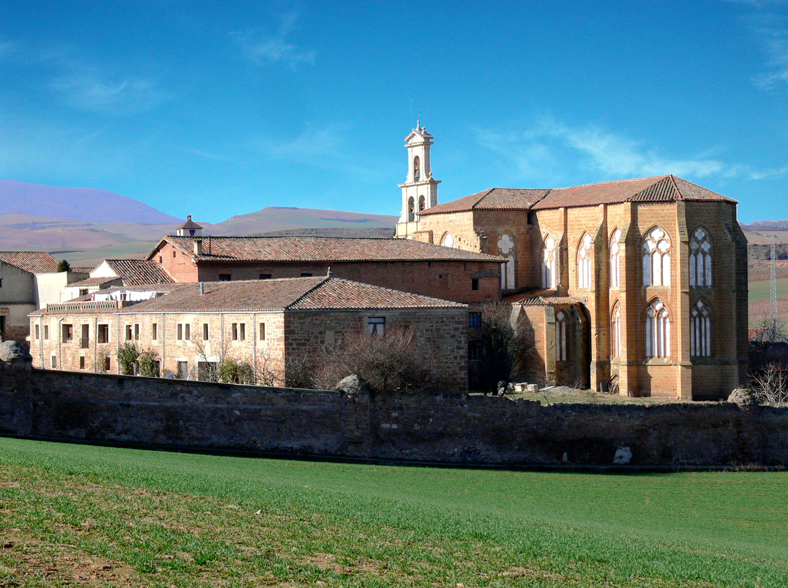 Monasterio de Cañas, (La Rioja - España).